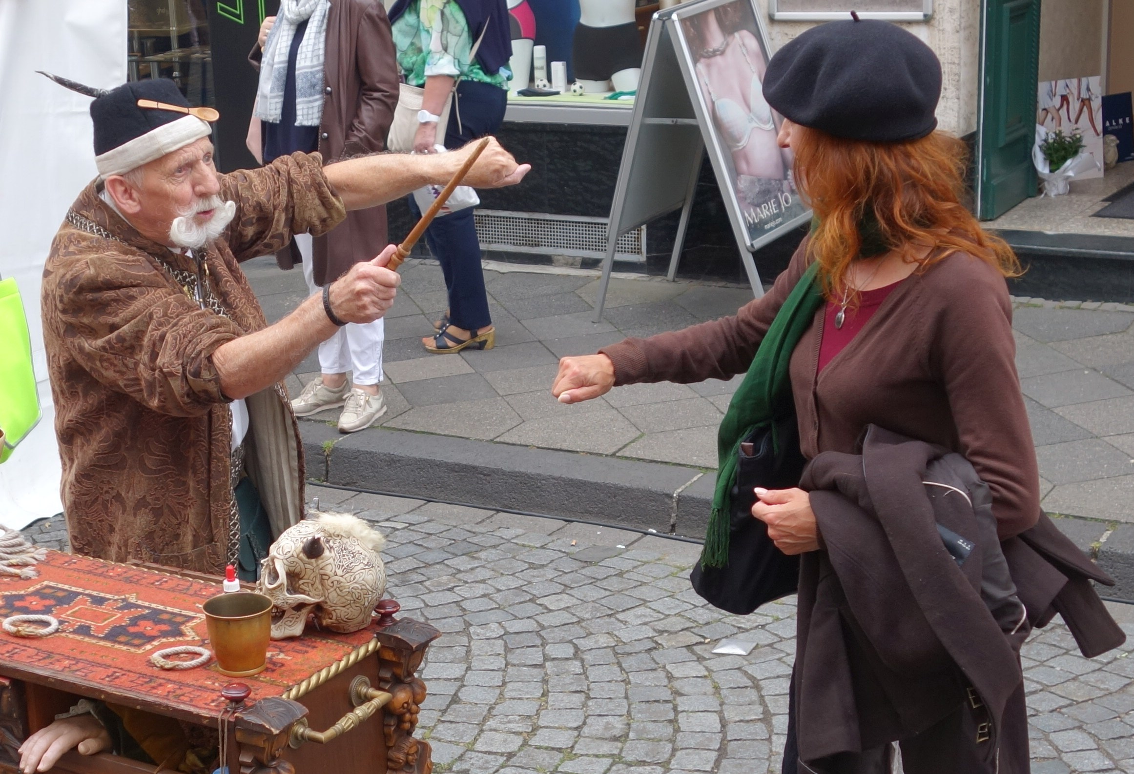 Düsseldorf, Hohe Straße Fest 2016. Ted McKoy Alders, Zauberer aus Nijmwegen.